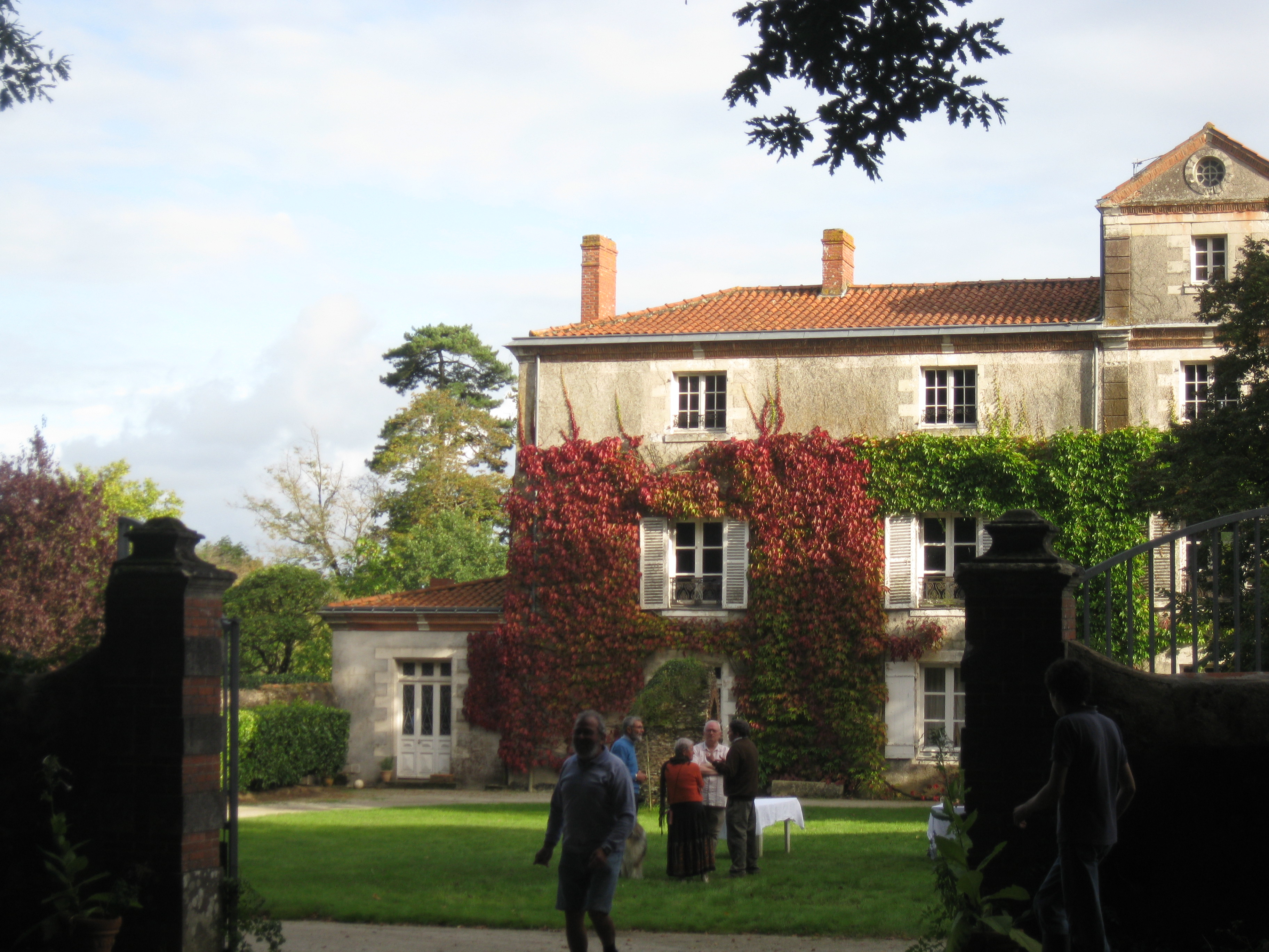 Vue du bâtiment principal, résidence du logis